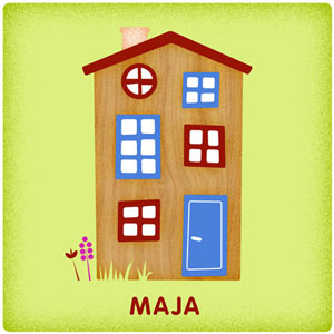 Beebiraamatu (mis-iial-ei-ilmunud) illustratsioon. Kujutab maja.